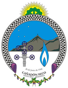 Escudo de la localidad de Cañadón Seco, Santa Cruz, Argentina.